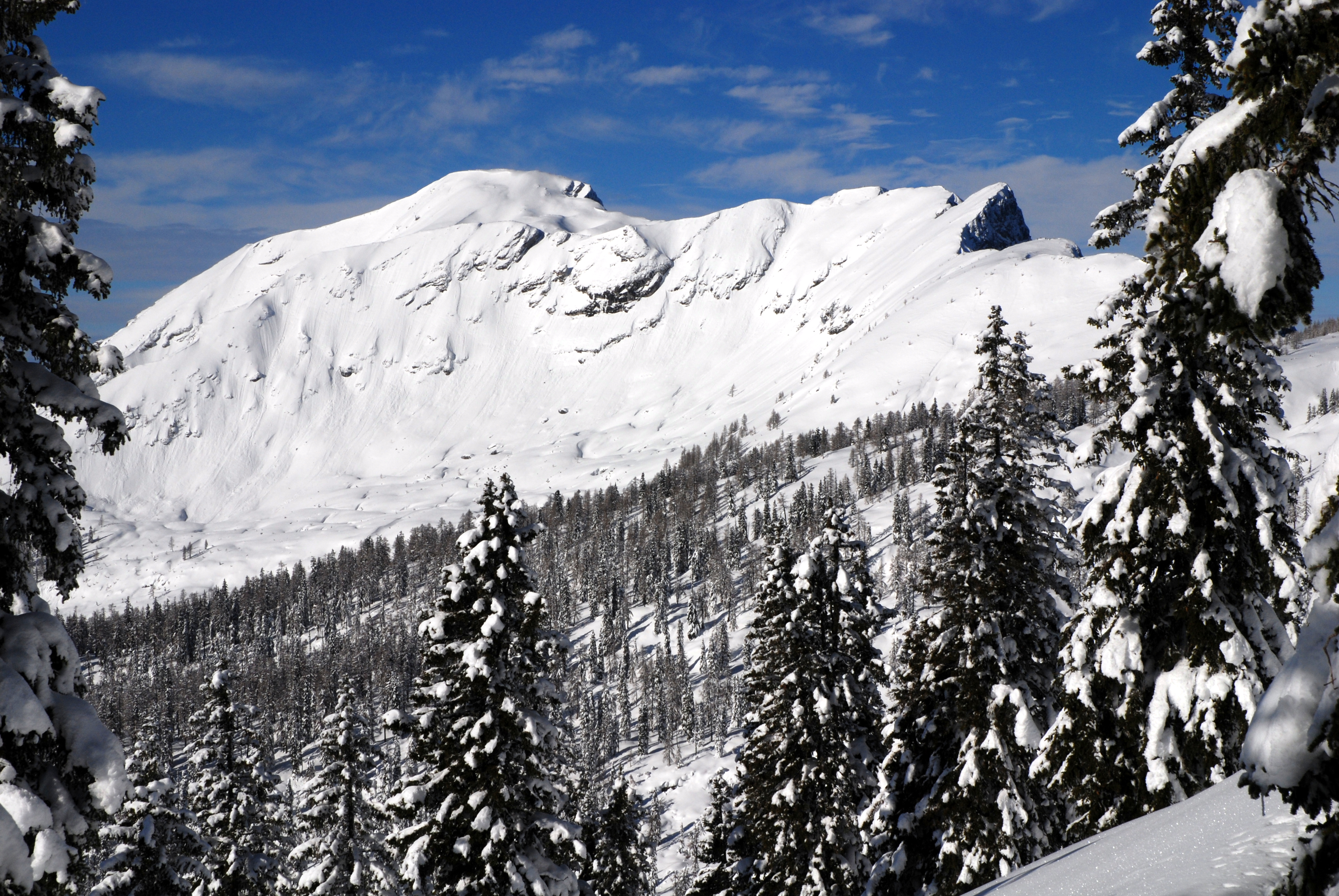 Blick vom Mayrwipfel auf den Hauptkamm des Sengsengebirges. Hoher Nock, vorgelagert Gamsplan, rechts Wagenschartenspitze, Österreich